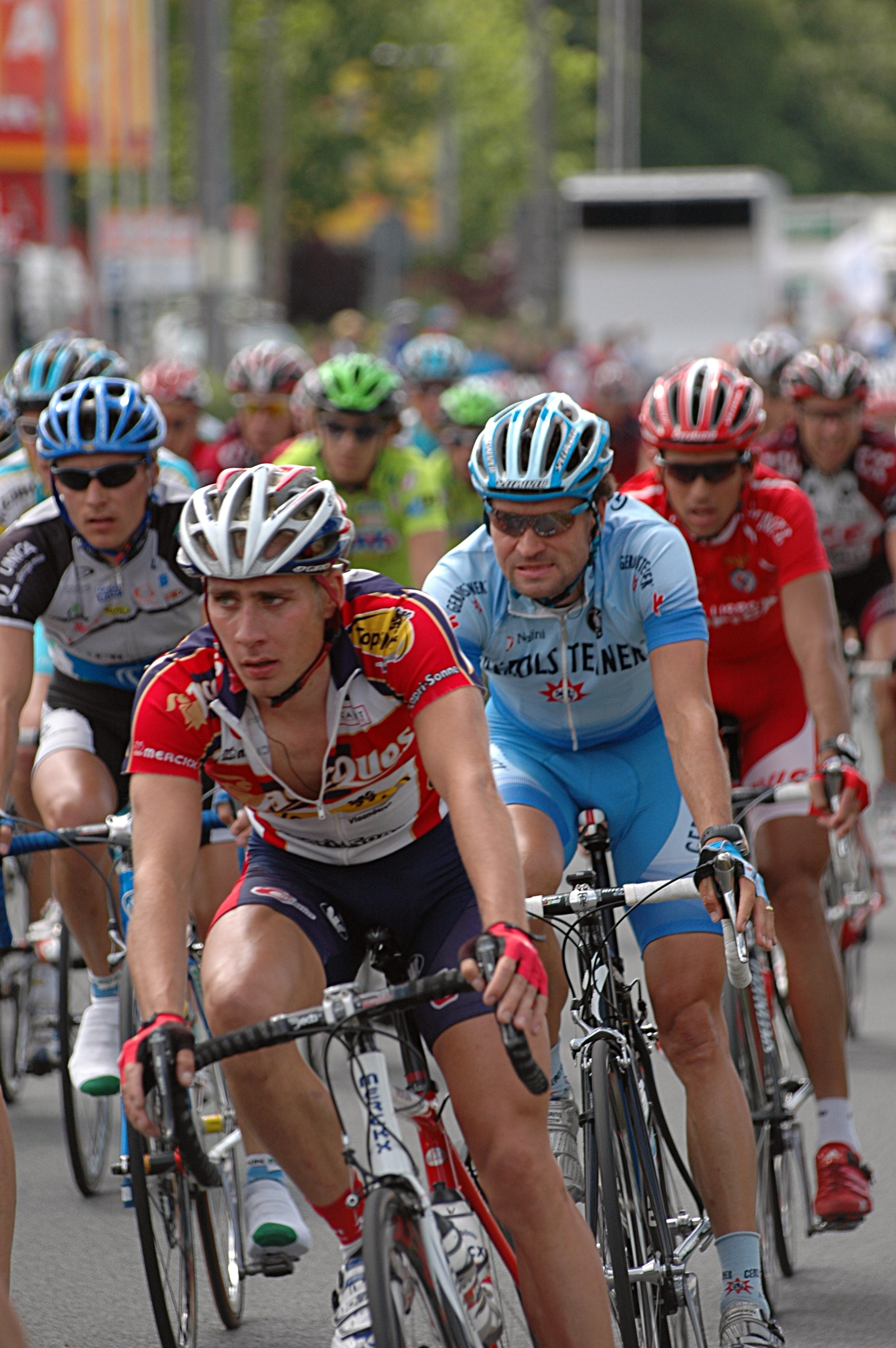 Sven Renders (in front) and Peter Wrolich at the Bayernrundfahrt 2007.